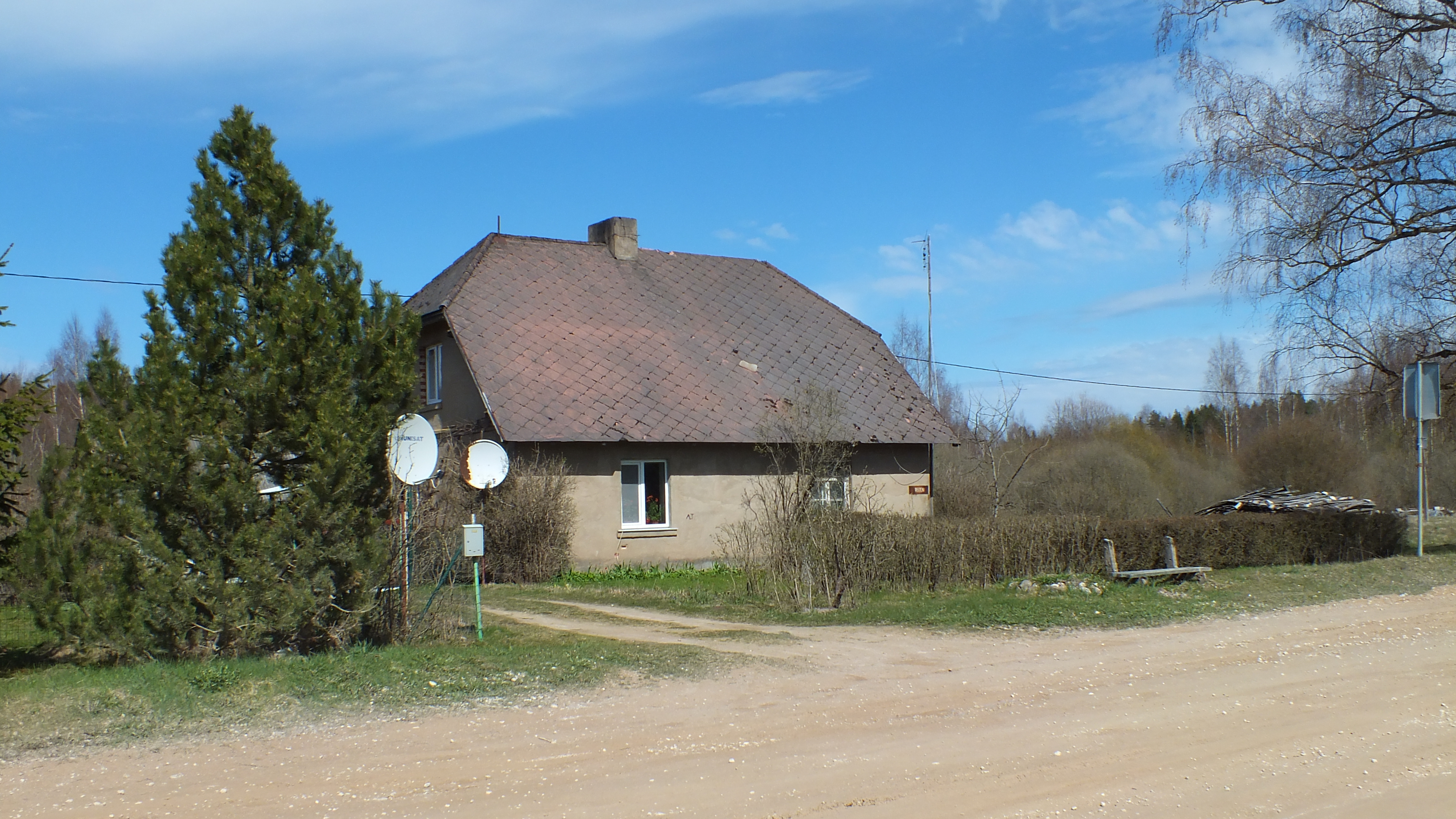 Reizenu mājas Reizenu ciemā